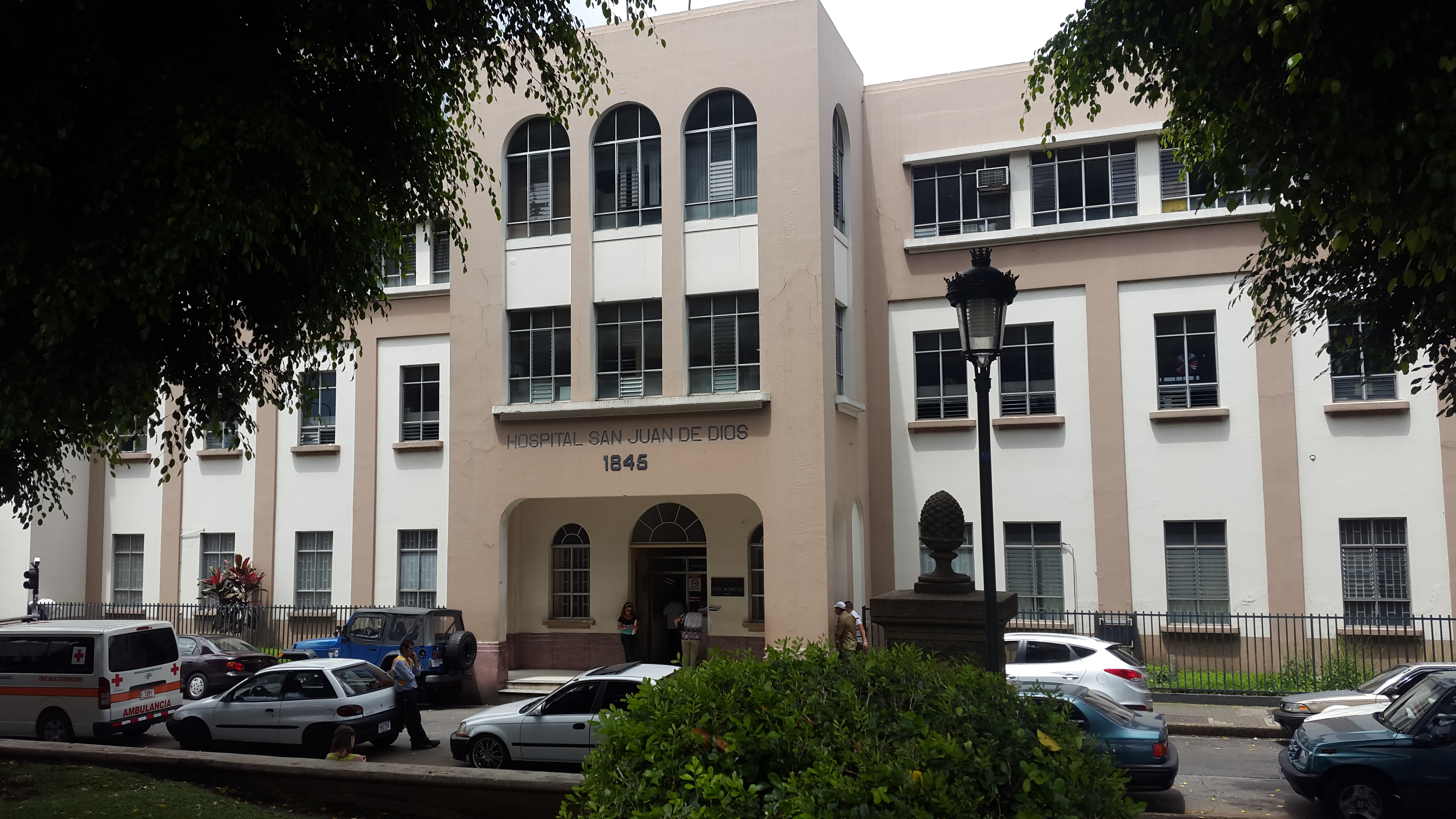 Fachada este del Hospital San Juan de Dios en San José de Costa Rica.